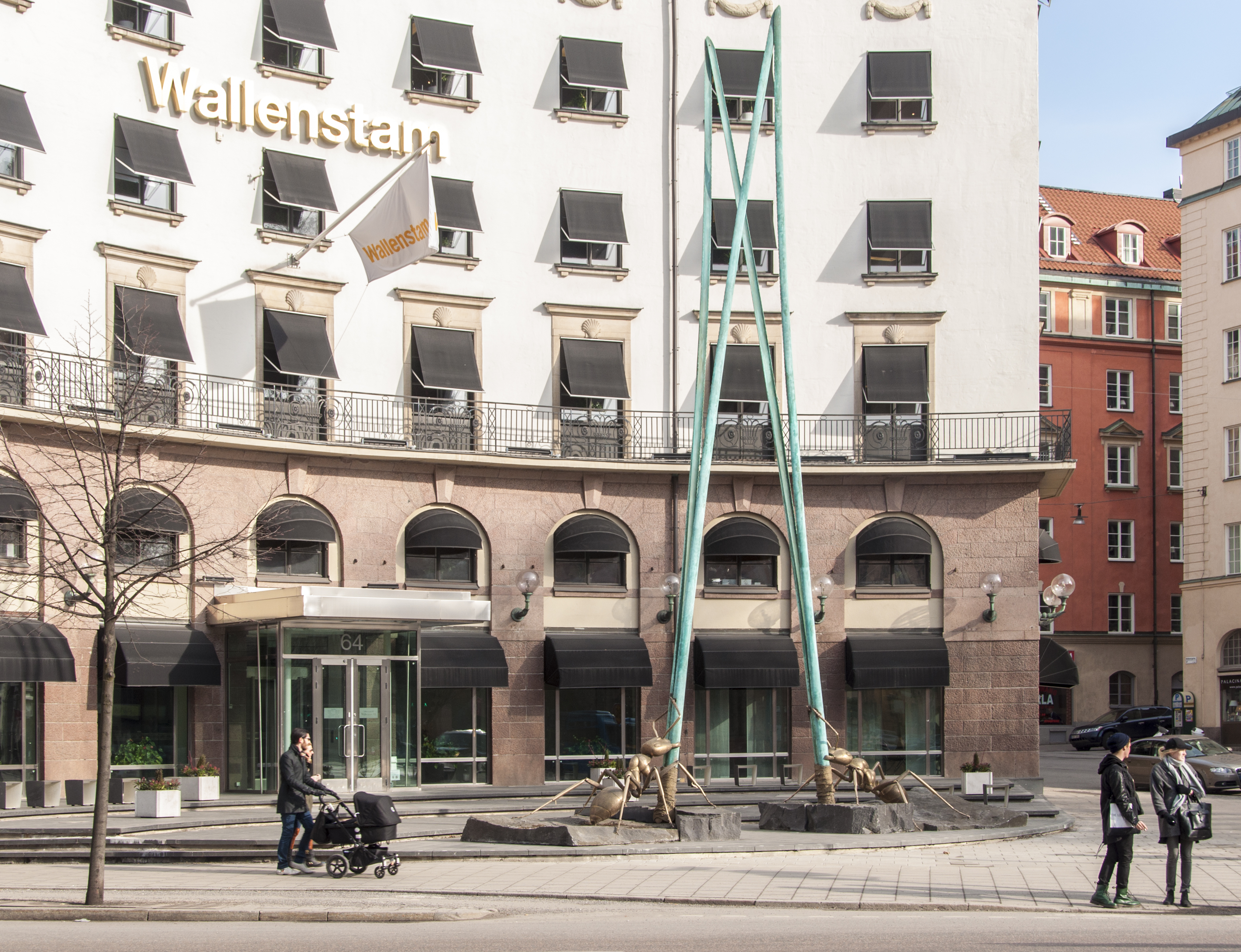 Skulpturen Två Myror, Torgny Larsson (2014)